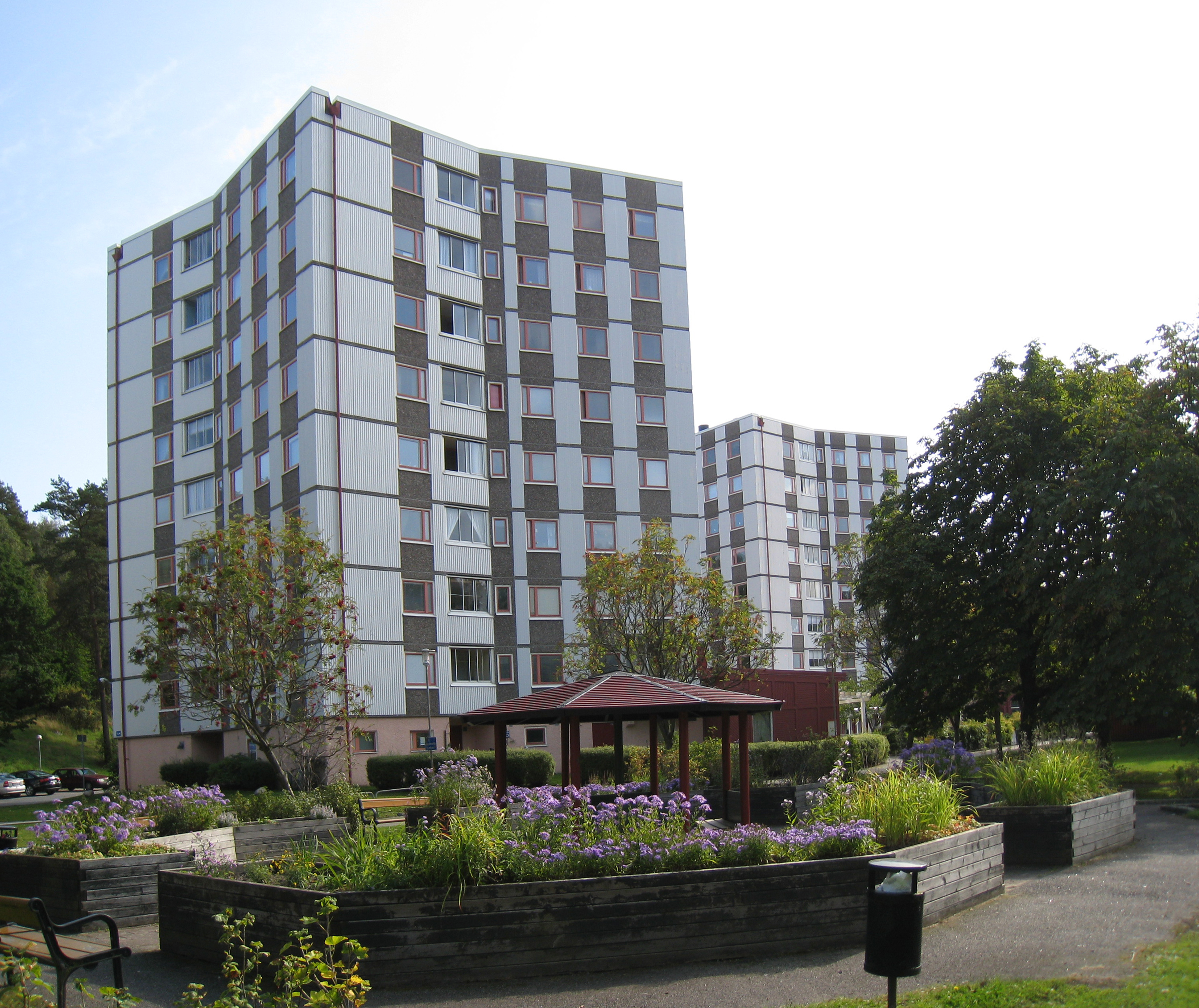 Housing estate. Teleskopgatan, Bergsjön, Göteborg